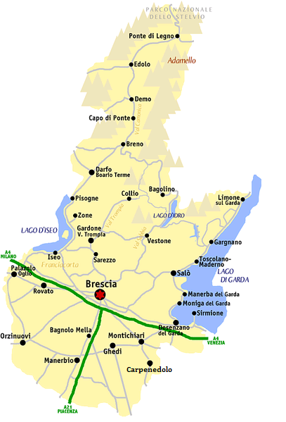 Cartina arricchita della provincia di Brescia